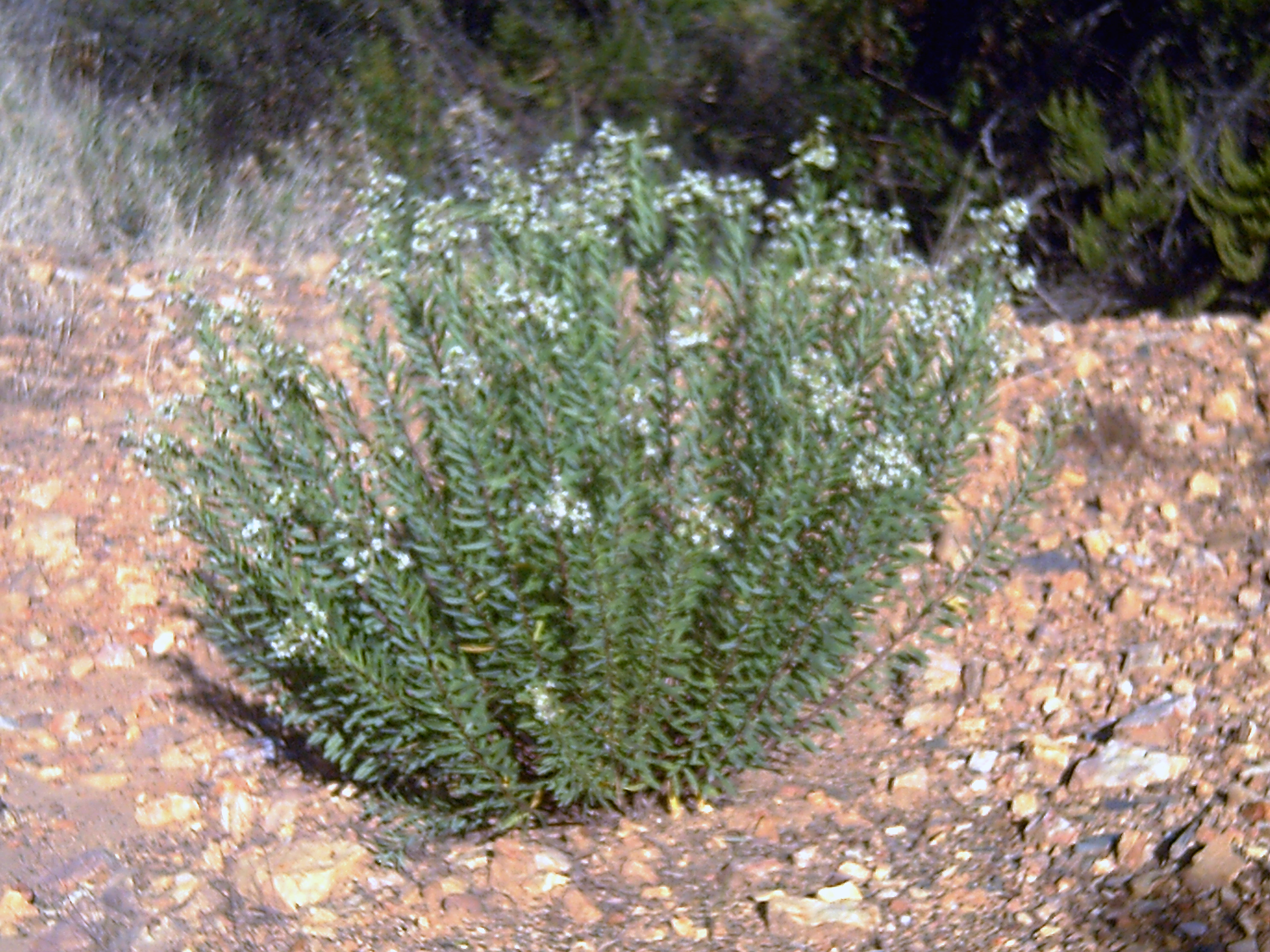 Daphne gnidium in Sierra Madrona